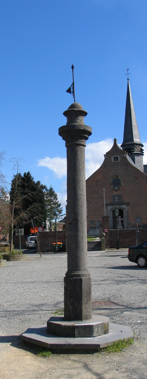 Schandpaal te Gaasbeek - eigen foto